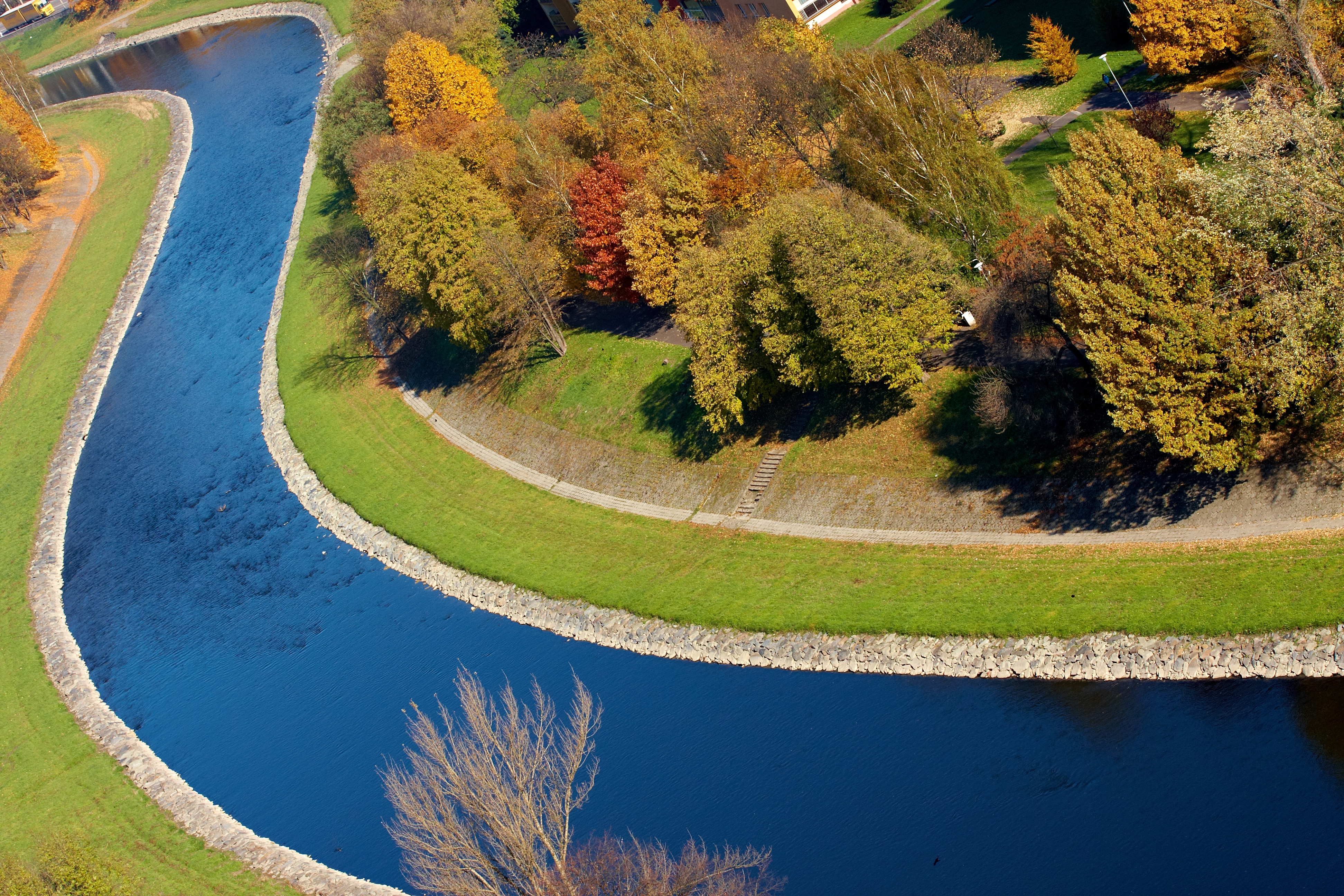 Řeka Ostravice